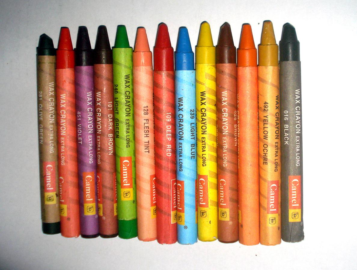 കടലാസിൽ നിറമുള്ള ചിത്രങ്ങൾ നിർമ്മിക്കാനുള്ള ചായക്കട്ടികൾ